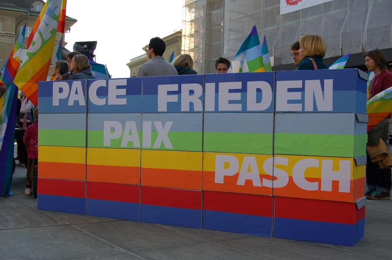 Einreichung der Eidgenössische Volksinitiative «für ein Verbot von Kriegsmaterial-Exporten» der GSoA in der Schweiz